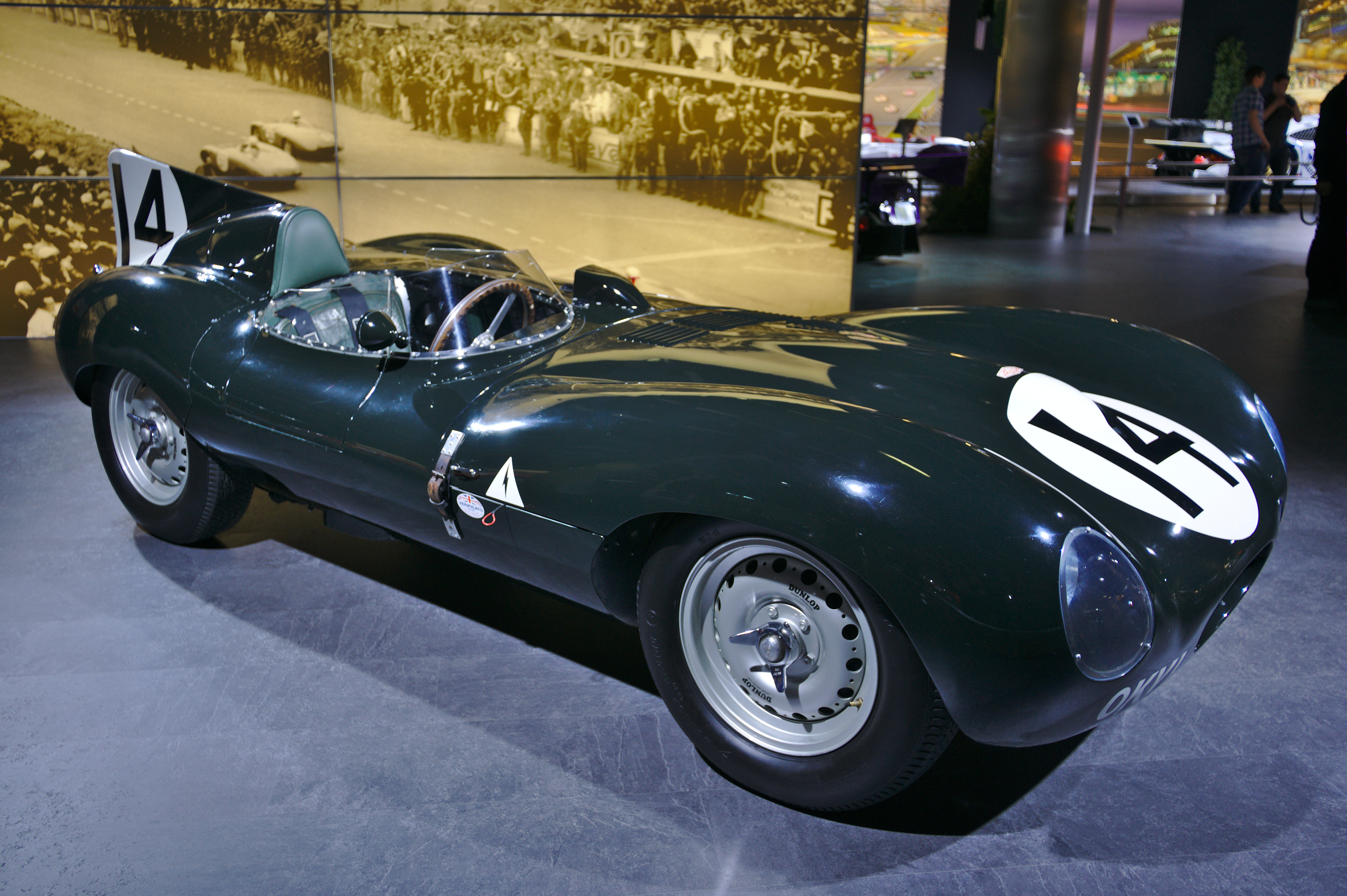 Salon de l'auto de Genève 2014 - 20140305 - Expo Le Mans